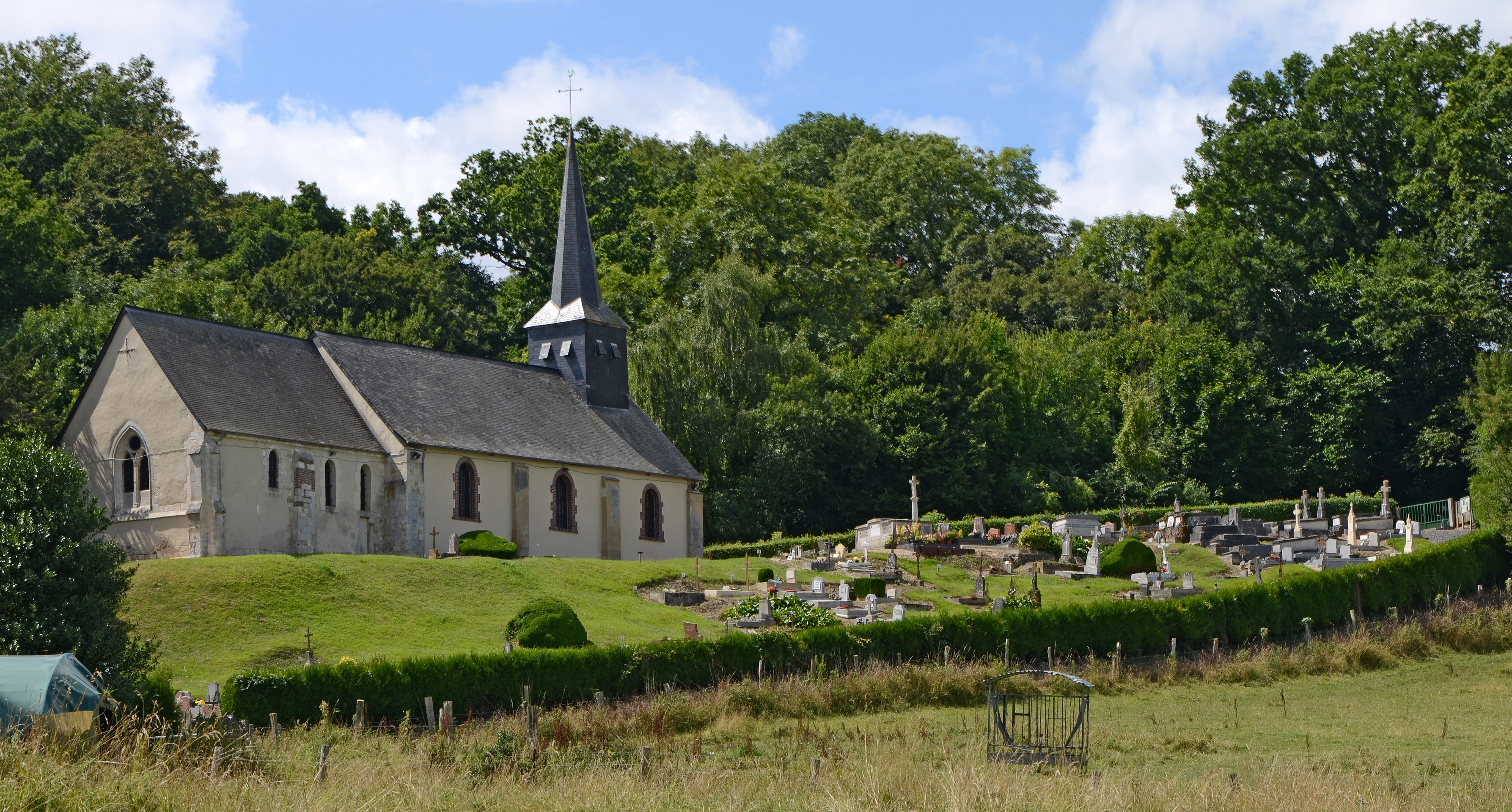 Église Saint-Martin et Saint-Pierre à Foulbec, Eure, France